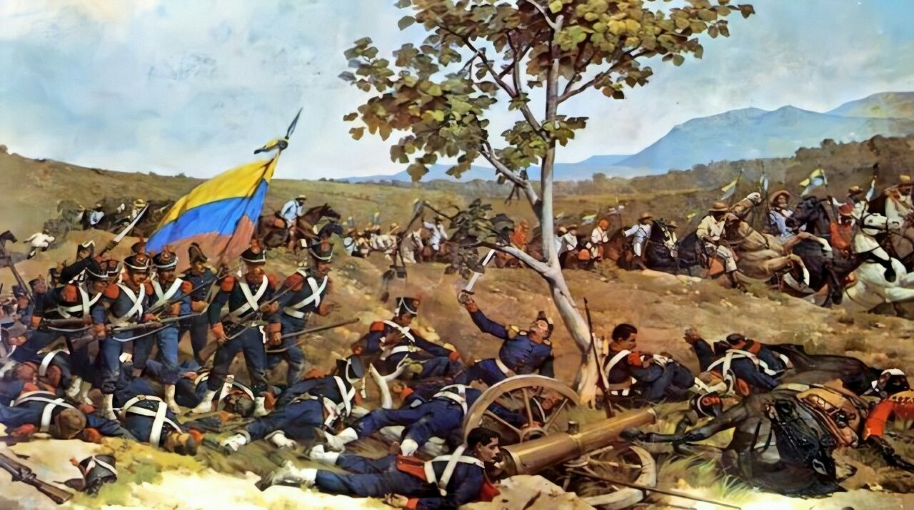 Óleo sobre tela de la Batalla de Carabobo, mural ubicado en el Capitolio Nacional de Venezuela.